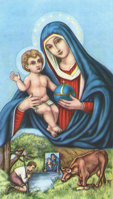 Immagine sacra raffigurante Maria SS. del Bosco, patrona di Niscemi